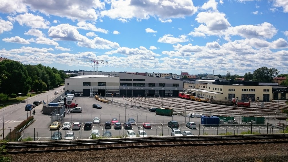 Hammarbydepån och Garagevägen till vänster i bild sommaren 2017.